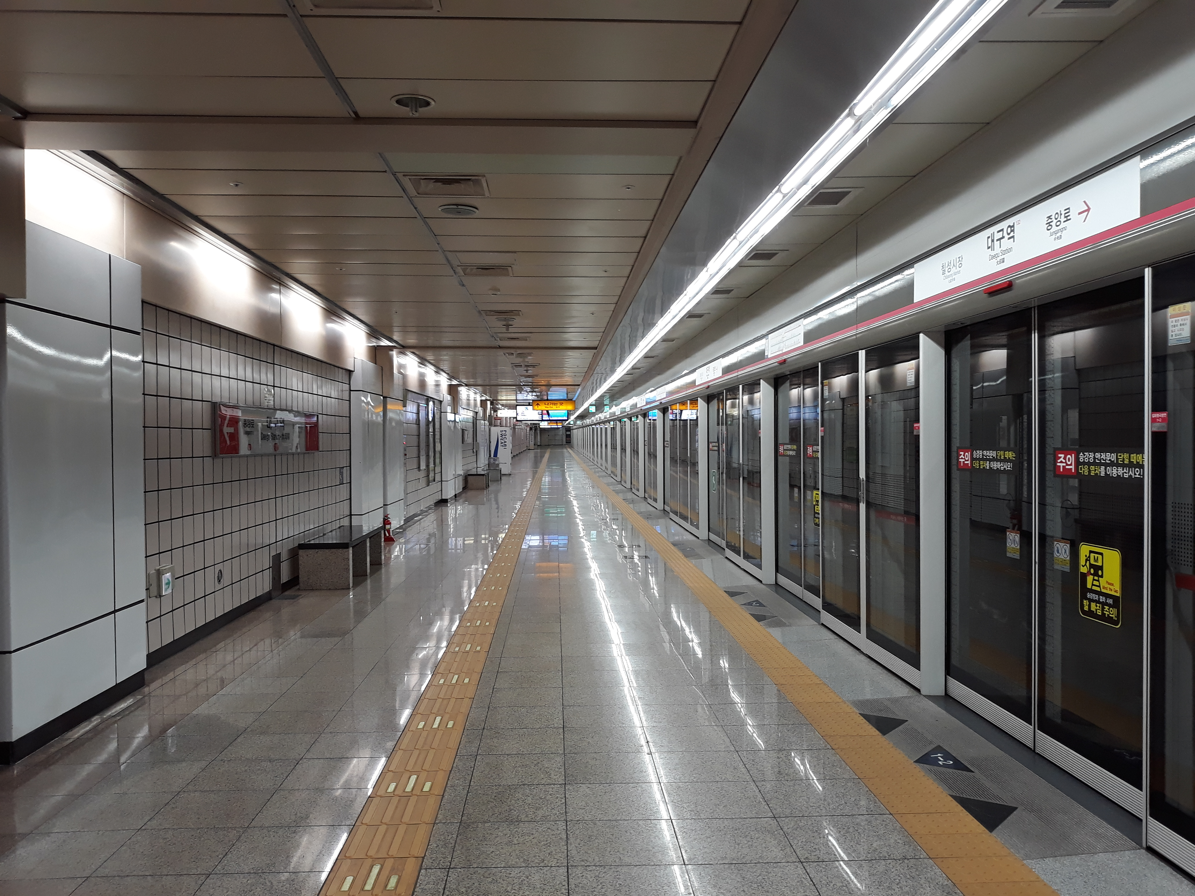 대구 도시철도 1호선 대구역 설화명곡 방면 역명판